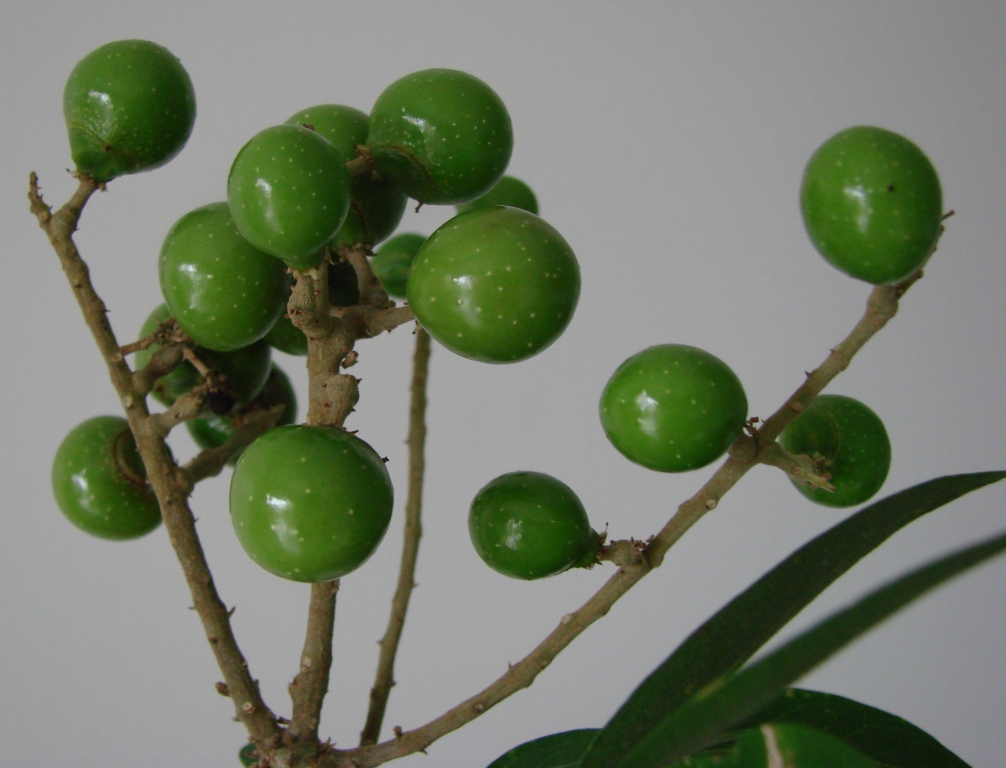 Fruits of Sapindus saponaria - SAPINDACEAE - SQN 311 - Brasília - Distrito Federal - Brasil.